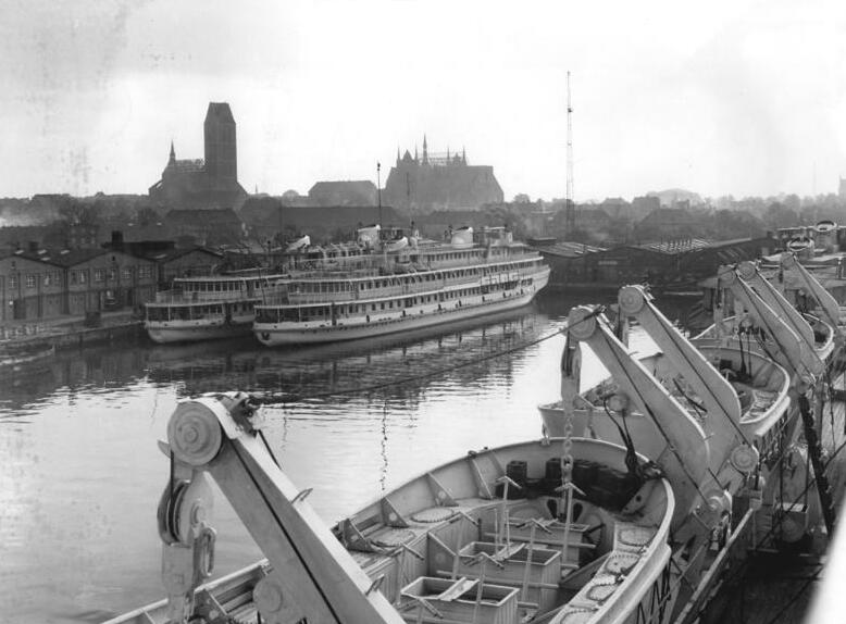 Mathias-Thesen-Werft, Wismar Zentralbild Mellahn 24.9.1958 Mathias-Thesen-Werft, Wismar UBz: Zwei Binnenfahrgastschifft am Ausrüstungskai der Werft. Im Hintergrund die Silhouette der alten Hafenstadt Wismar mit der Marien- und der Georgenkirche.